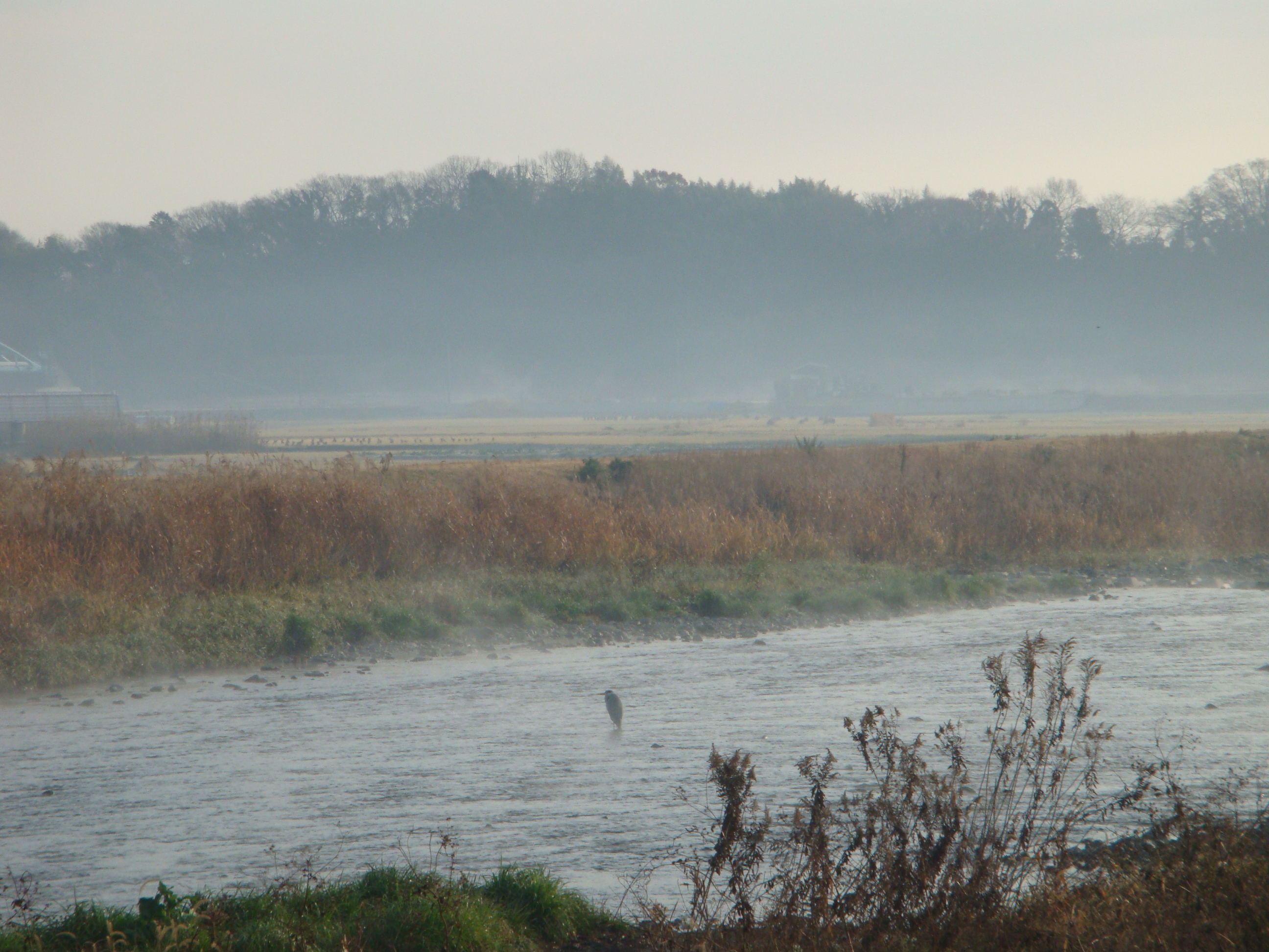 冬の金目川